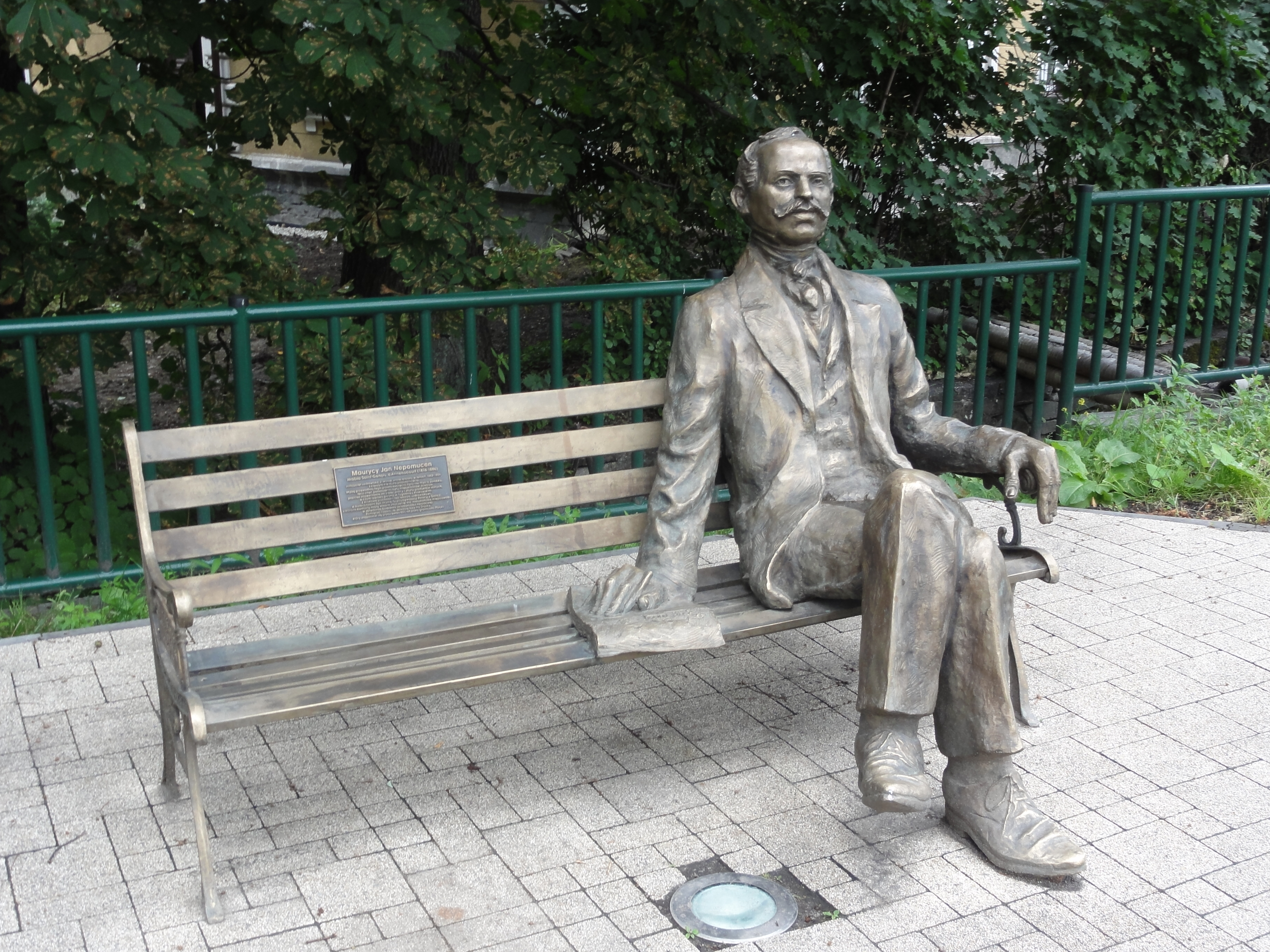 Rzeźba Maurycego Jana Nepomucena w Jaworzu